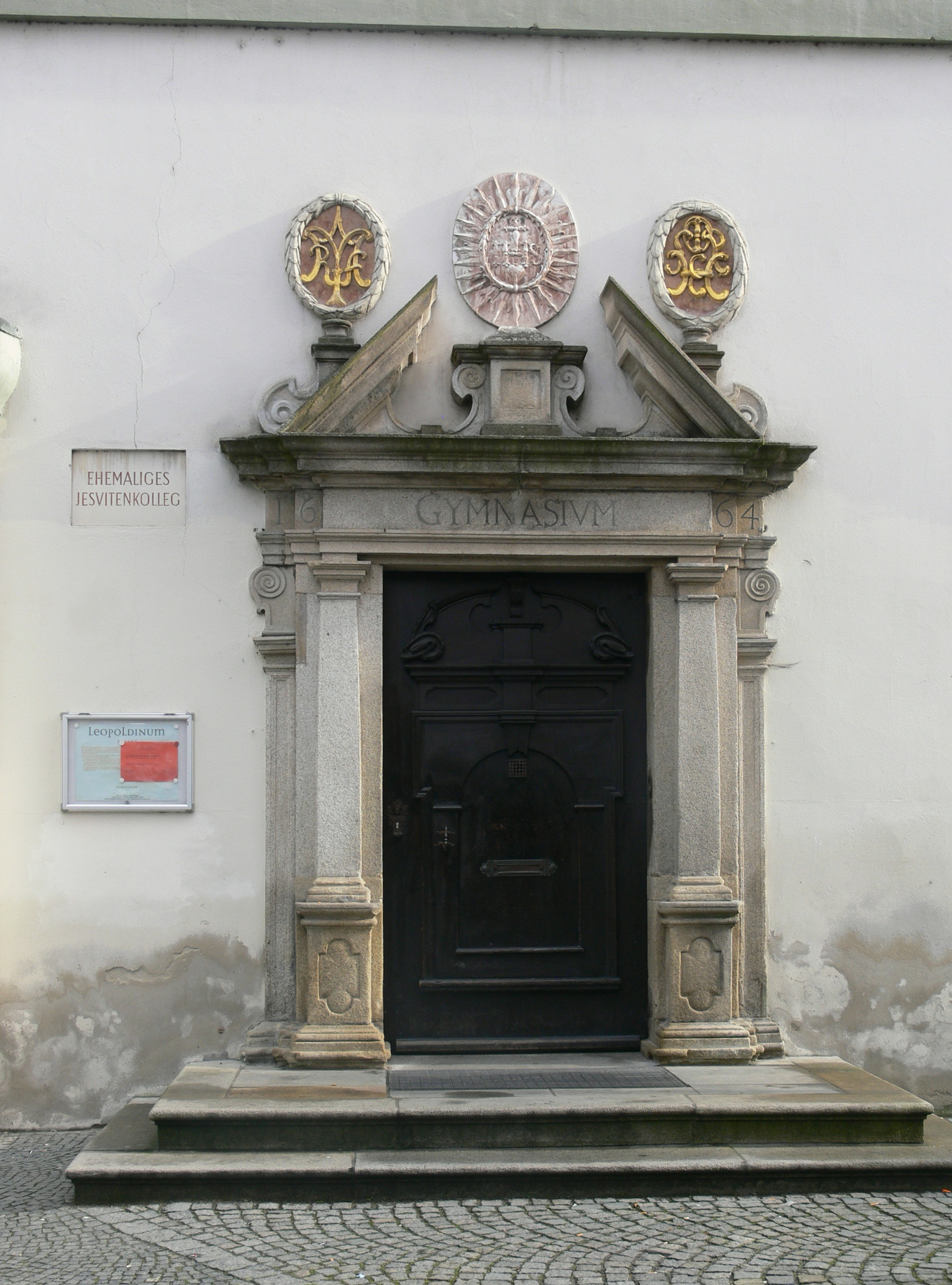 Passau, Portal des ehem. Jesuitenkollegs (Gymnasium Leopoldinum)